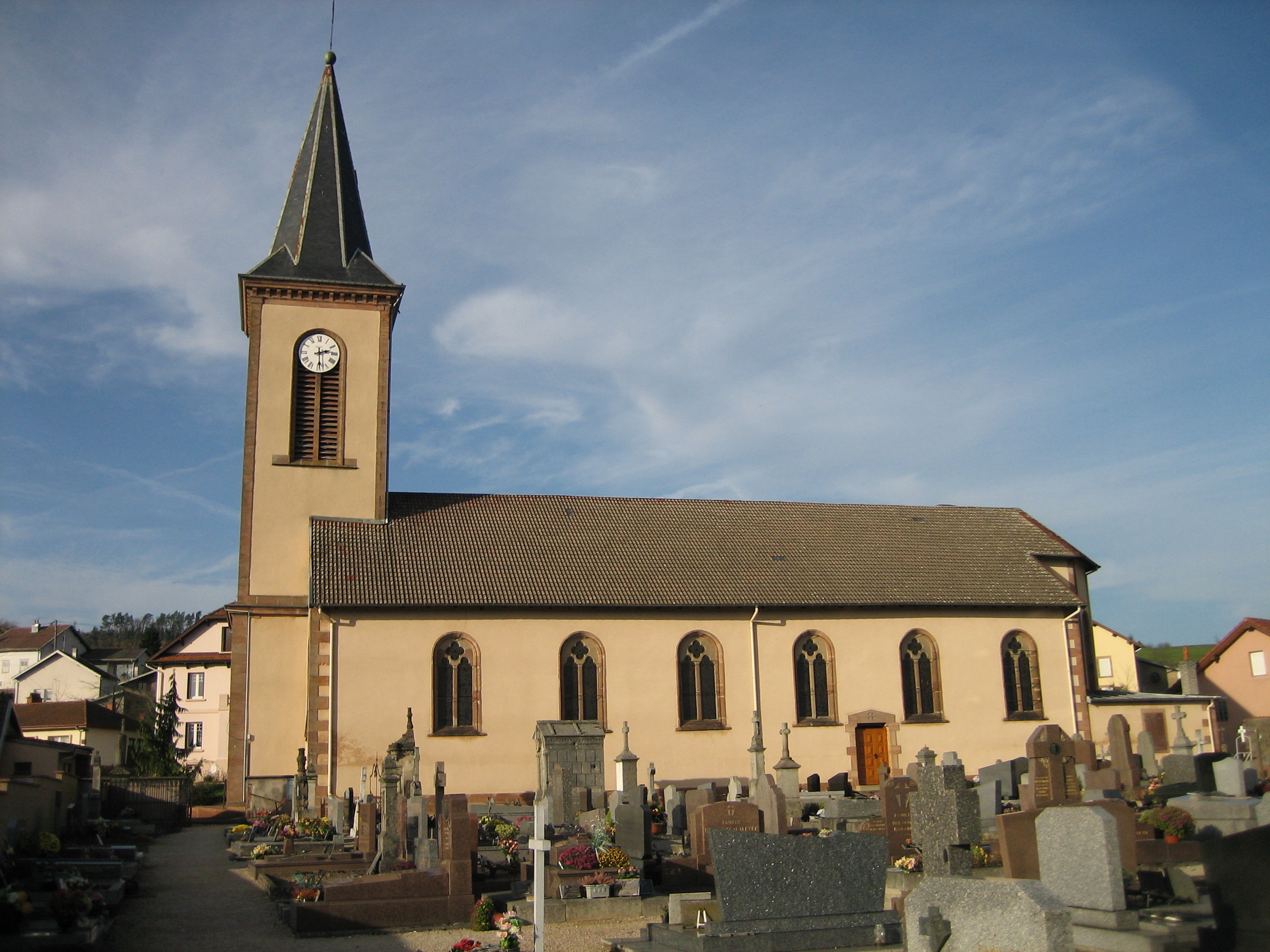 église sainte Libaire de Lépanges avec le cimetière par raphael tassin le 26/11/2006